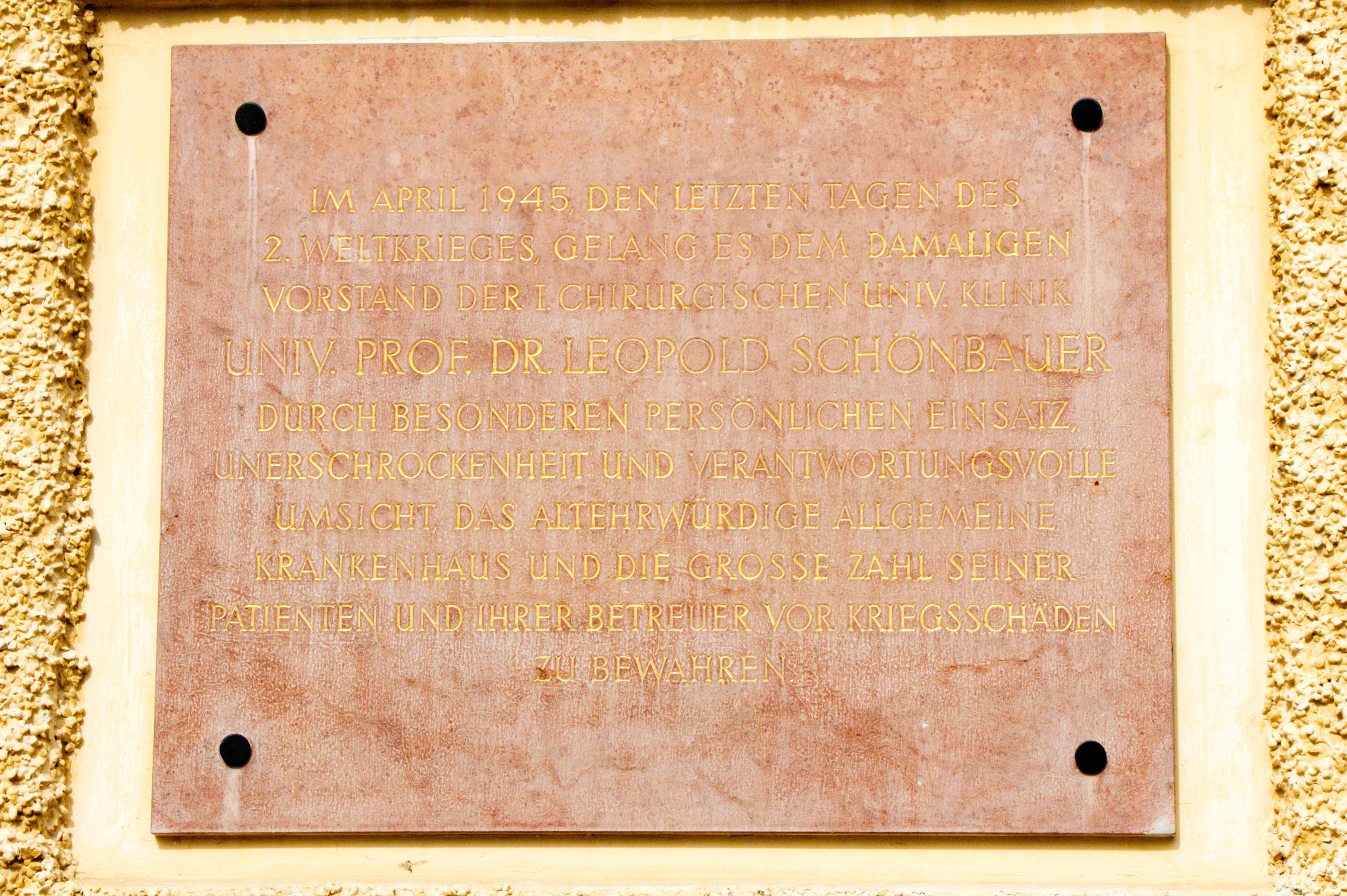 Tafel für Leopold Schönbauer im Hof 1 des Alten AKH in Wien